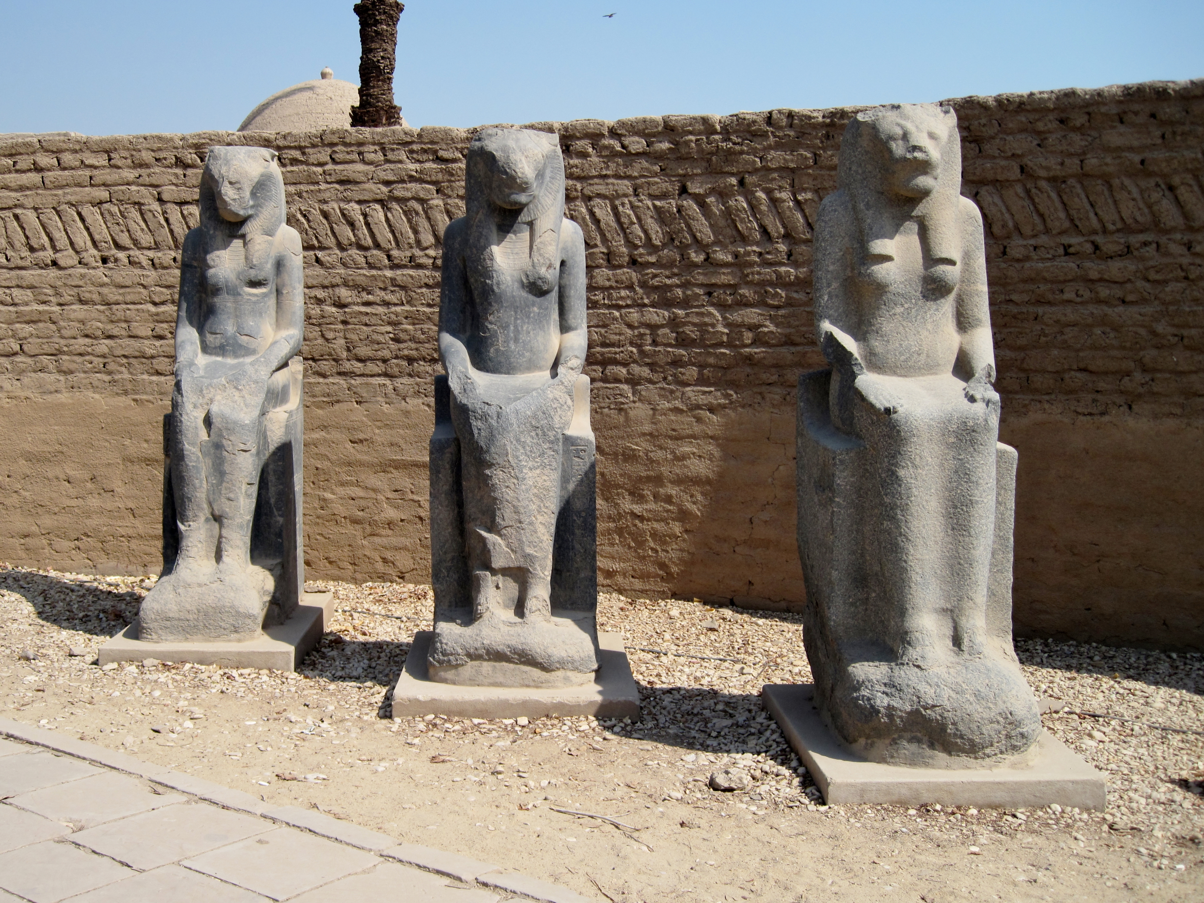 Sitzbilder der Sachmet aus dem ehemaligen Mut-Tempel aus Diorit im Freilichtmuseum von Karnak, nördlich von Luxor, Ägypten